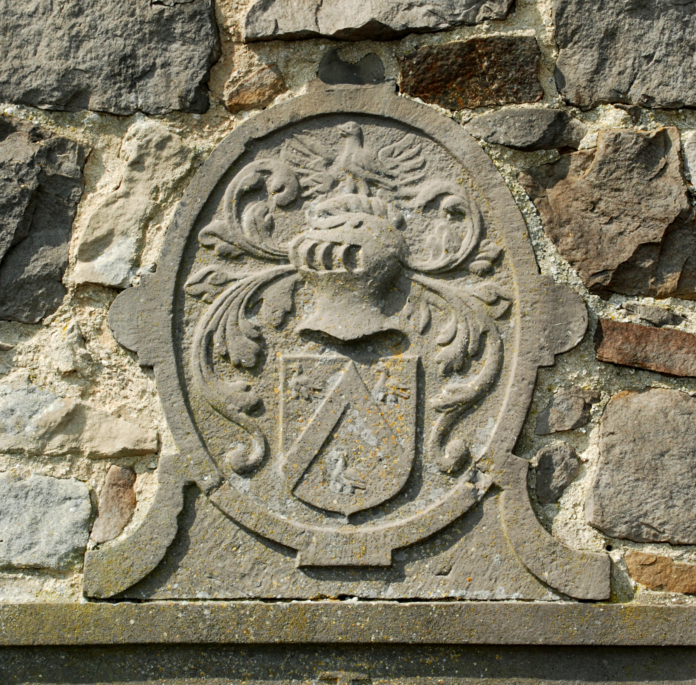 Belgique - Brabant wallon - Jodoigne - Piétrain - Chapelle Sainte-Catherine d'Herbais